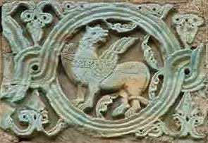 რუისის ტაძრის რელიეფის ფრაგმენტი